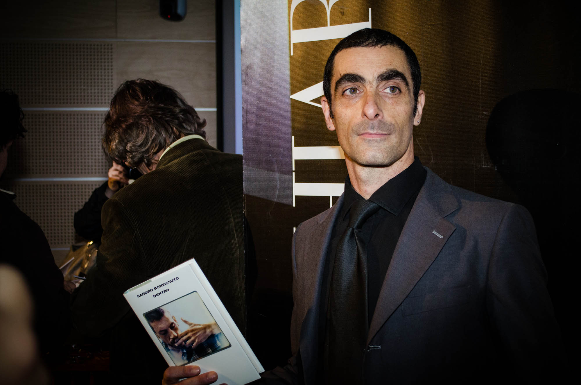 lo scrittore Sandro Bonvissuto, vincitore del Premio Chiara 2013